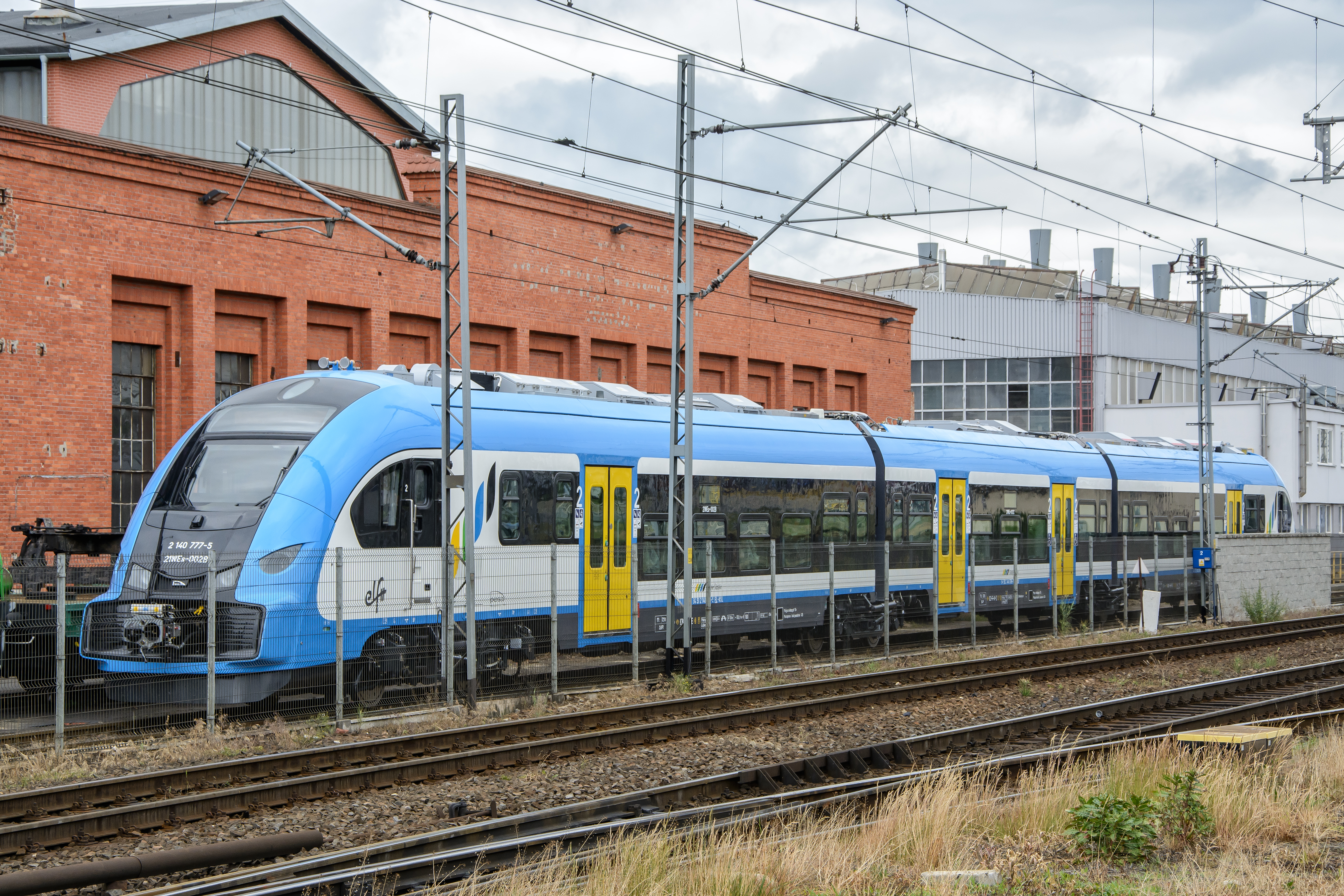 Elektryczny zespół trakcyjny Pesa Elf II 21WEa-002 dla Kolei Śląskich stoi na terenie Pesy Bydgoszcz.